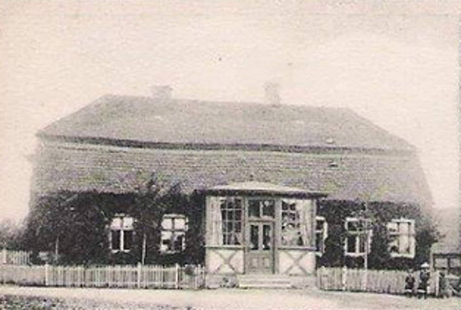 Krukowo